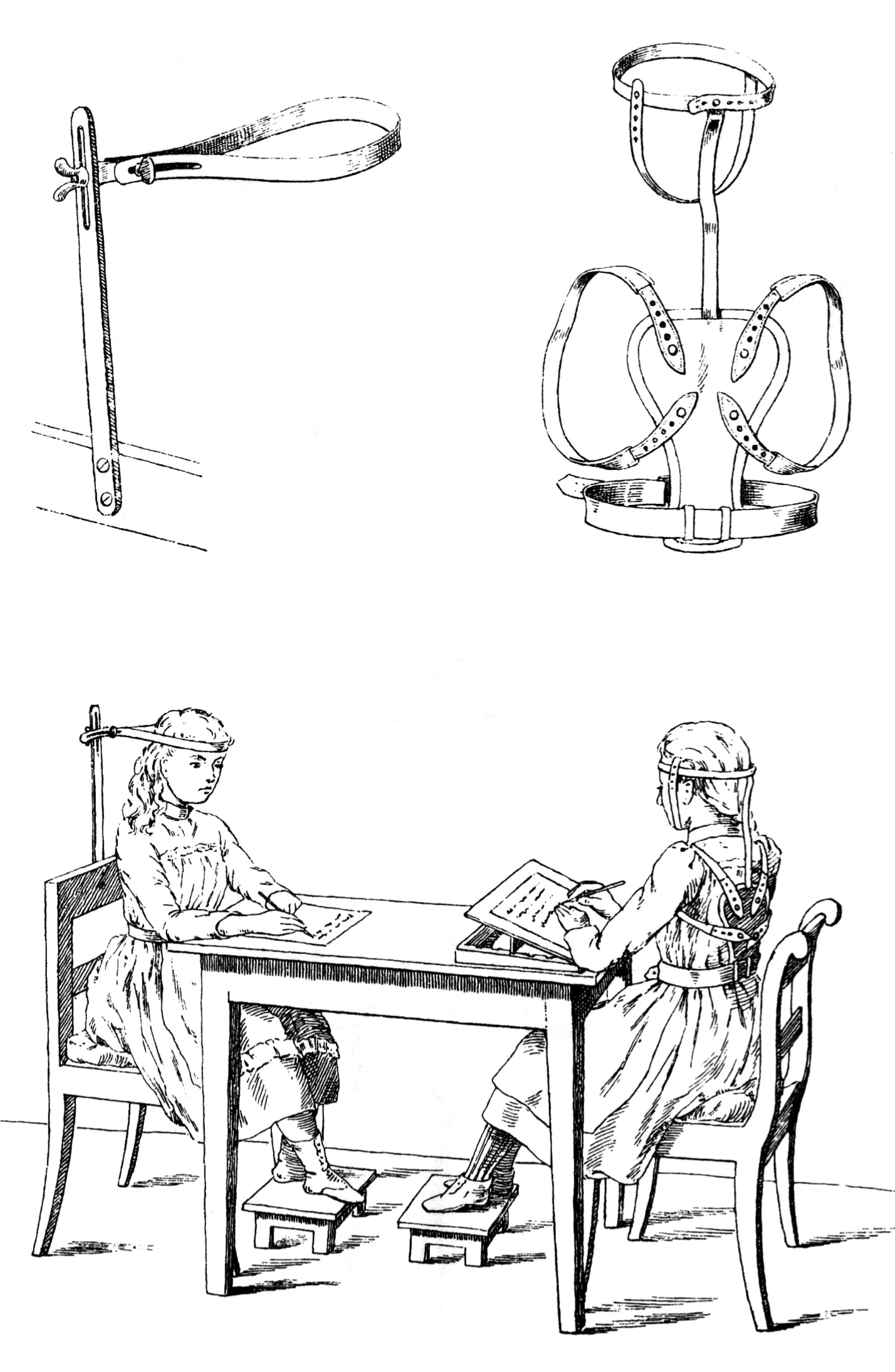 Geradhalter. Ein orthopädisches Gerät für aufrechte Sitzhaltung. Entworfen von Moritz Schreber